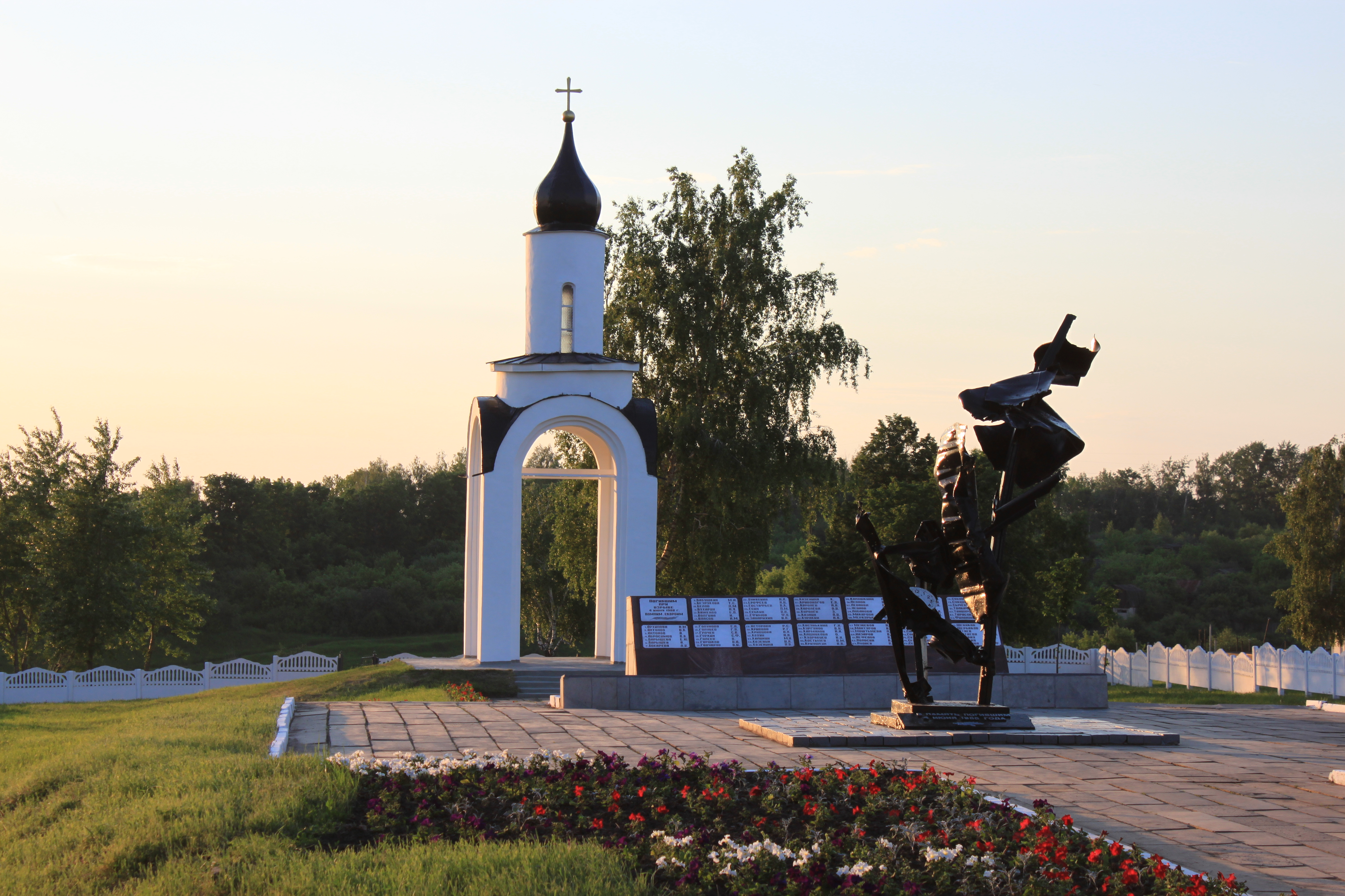 De monument